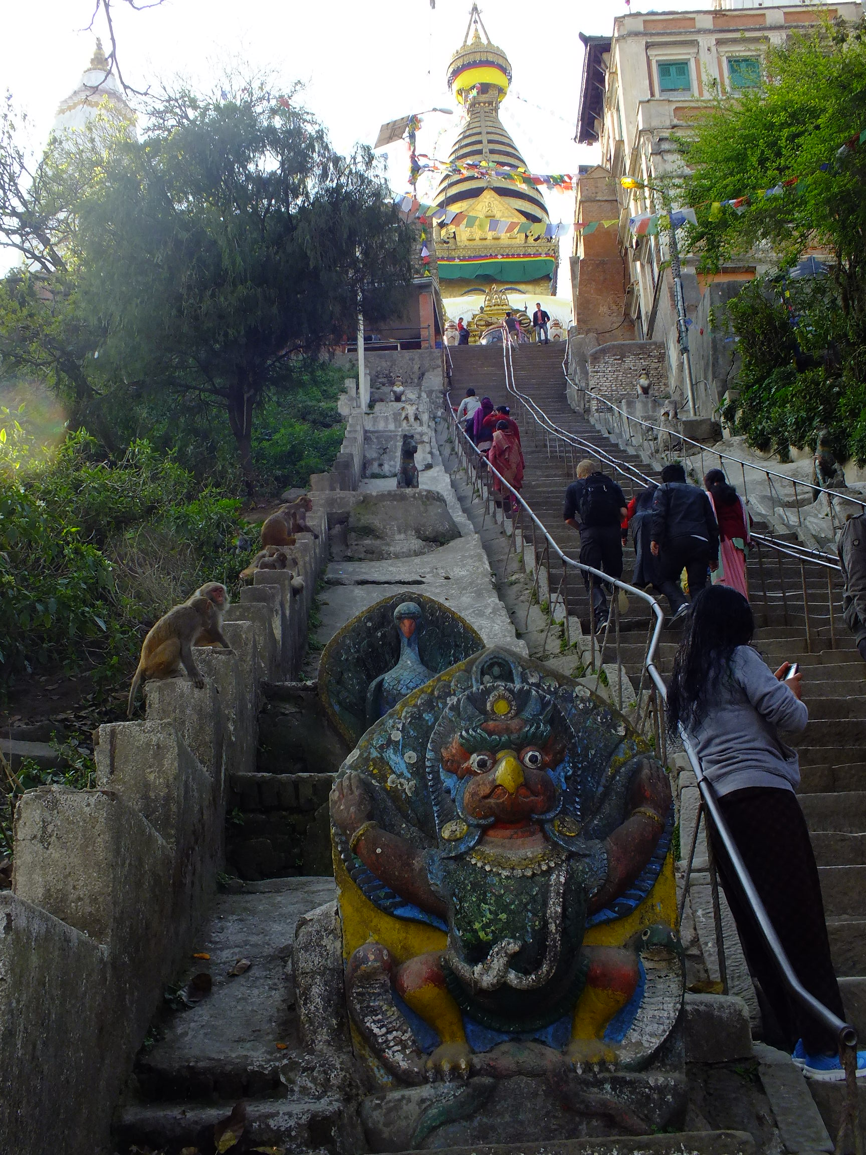 2015-03-08 Swayambhunath,Katmandu,Nepal,சுயம்புநாதர் கோயில்,スワヤンブナート